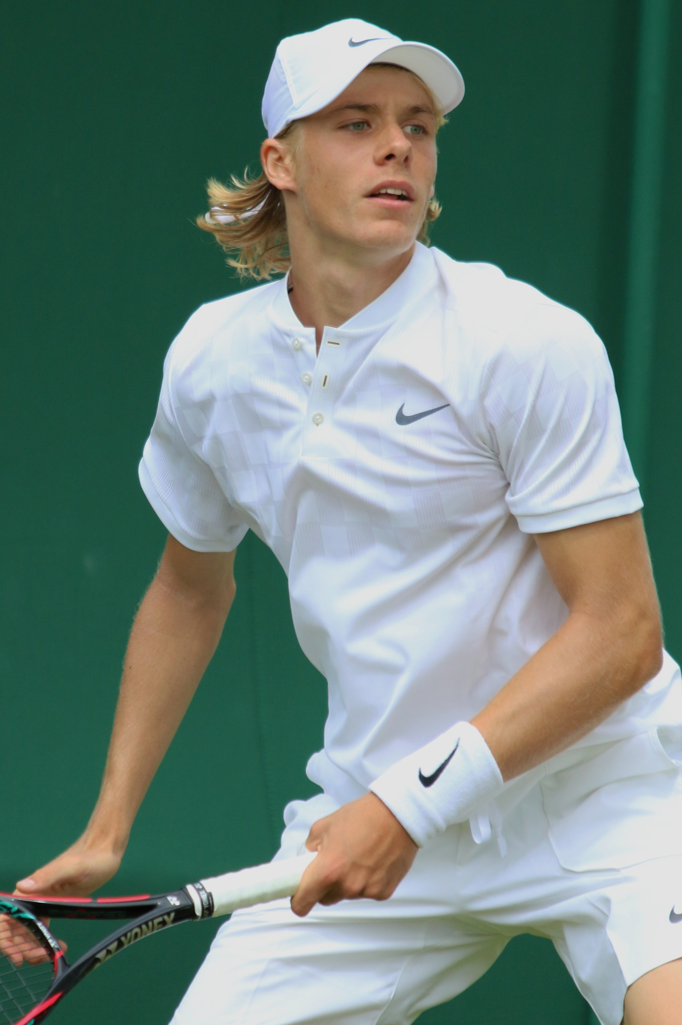 Shapovalov WM17 (14)